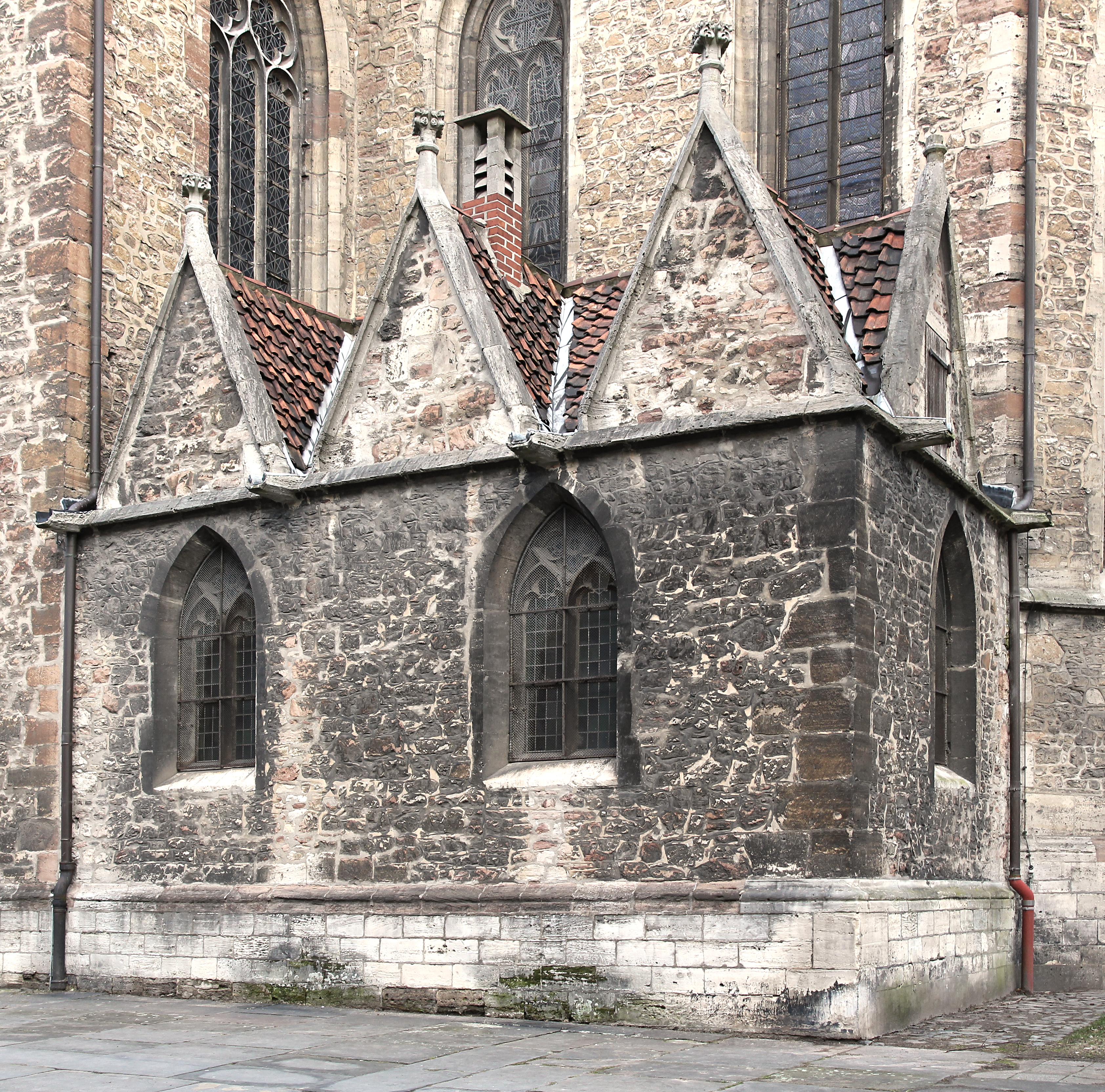 St. Petrikirche in Braunschweig, Annenkapelle an der Südostseite